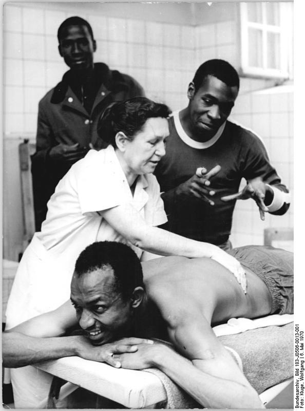 Leipzig, DHfK, Massage Zentralbild Kluge 6.5.1970 Leipzig: VII. Internationaler Trainerlehrgang an der DHfK. Frau Feldmann bildet die Lehrgangsteilnehmer im Fach Massage aus. Hier übt sie mit Mamadou Balde (liegend) und Dauda Sylla (beide aus Guinea). 72 Sportler, Sportlehrer und Funktionäre aus neun Ländern Afrikas und Asiens nehmen an dem achtmonatigen Trainerlehrgang teil, der seit Anfang April 1970 läuft und mit der Vergabe von Trainerdiplomen in den Sportarten Leichtathletik, Fußball, Turnen, Schwimmen, Basketball, Volleyball oder Boxen im November seinen Abschluß finden wird.